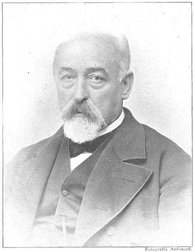 Retrato de Marian Aguiló y Fuster, fotografía de Audouard recogida en la revista La Ilustració Catalana.